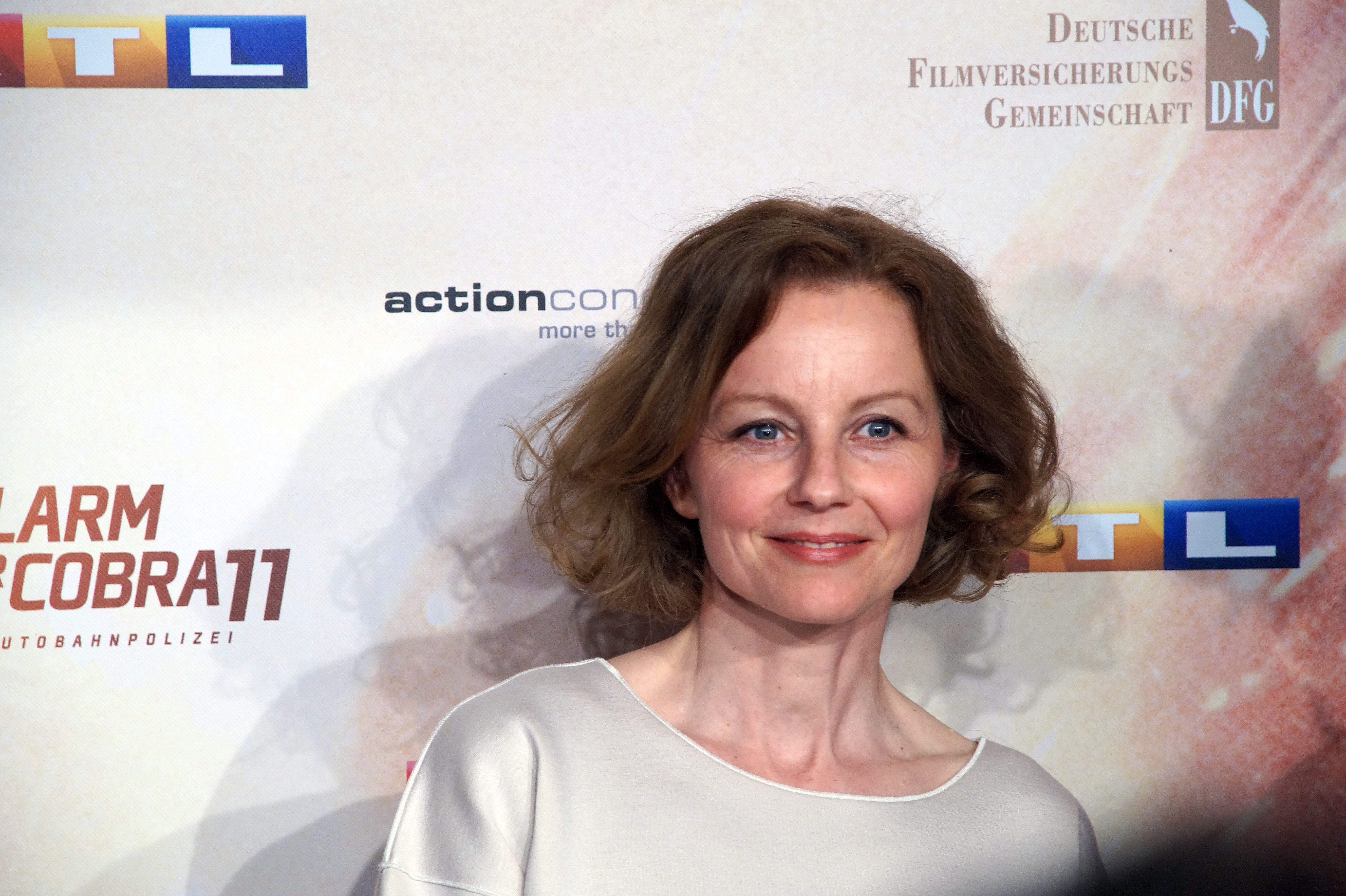 Carina Wiese bei der Premiere von der 300. Folge 'Alarm für Cobra 11', April 2016.